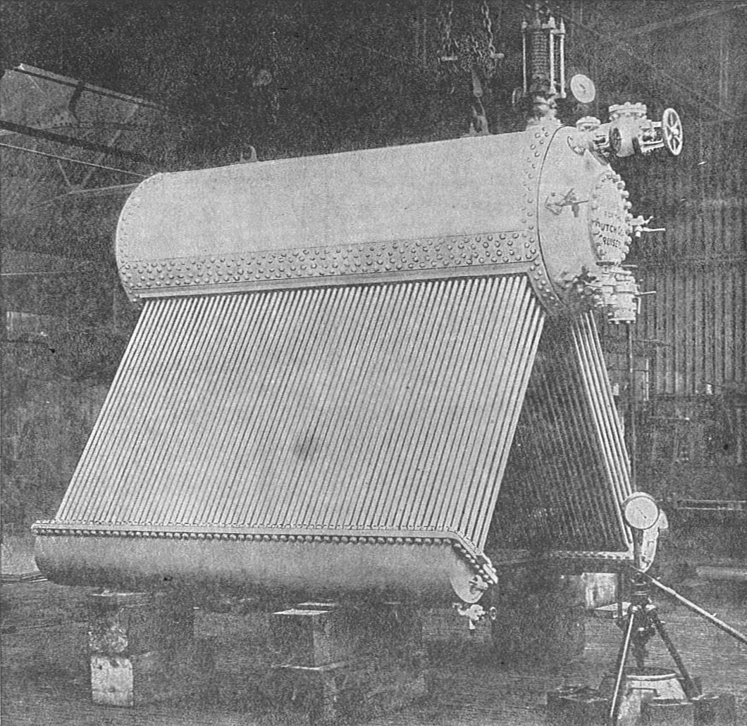 Yarrow boiler tubes (Rankin Kennedy, Modern Engines, Vol VI).jpgFig. 86